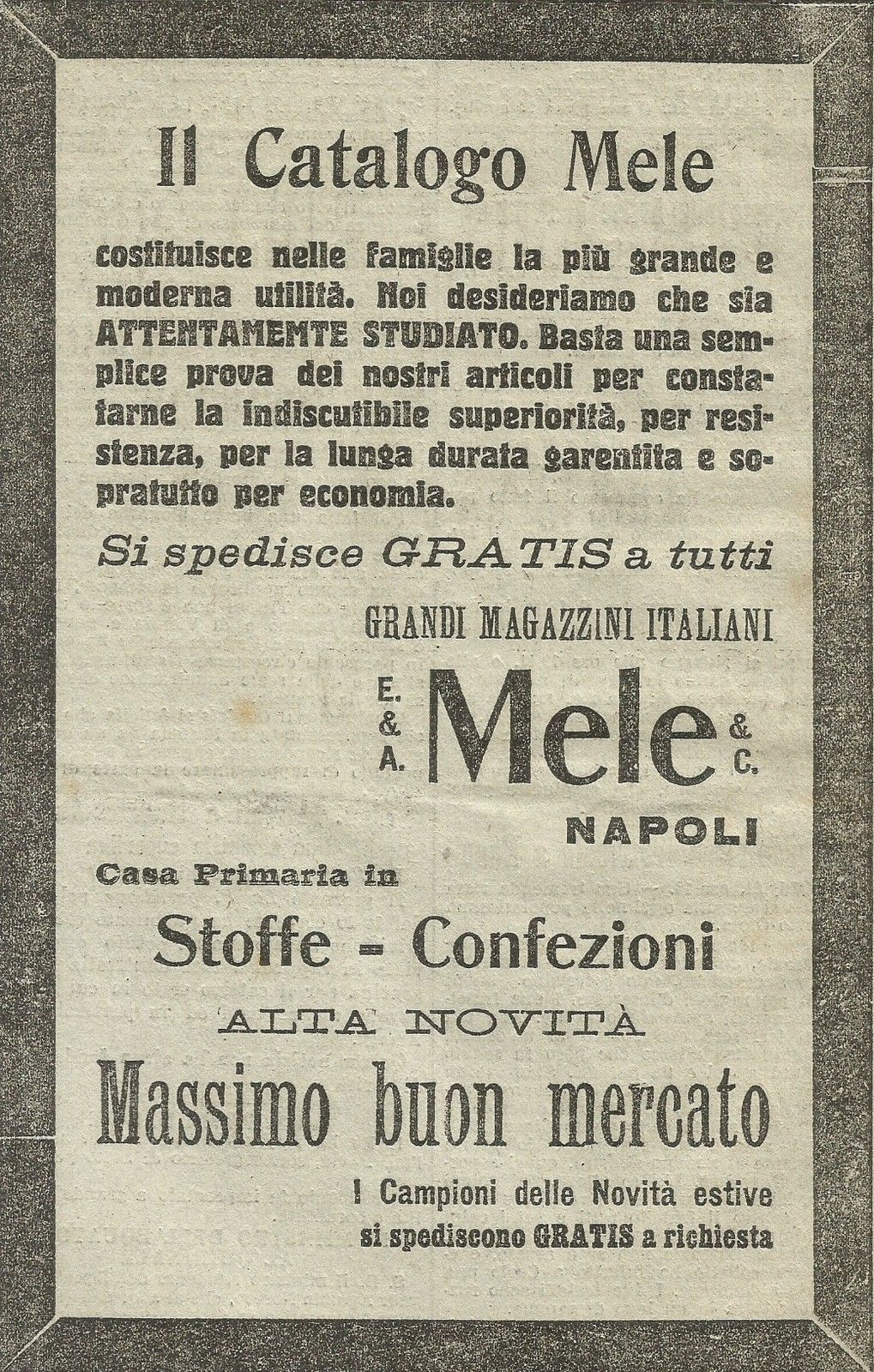 Pubblicità Grandi Magazzini Mele